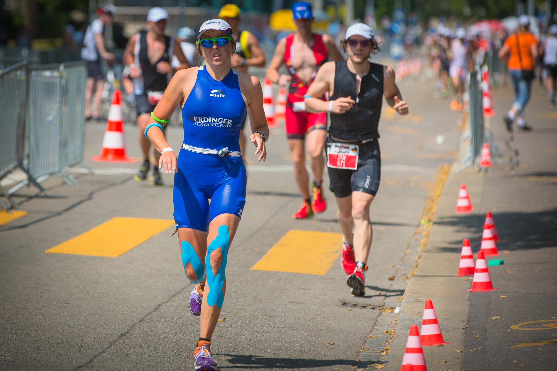 Katrin Esefeld at Ironman Switzerland 2013.jpg